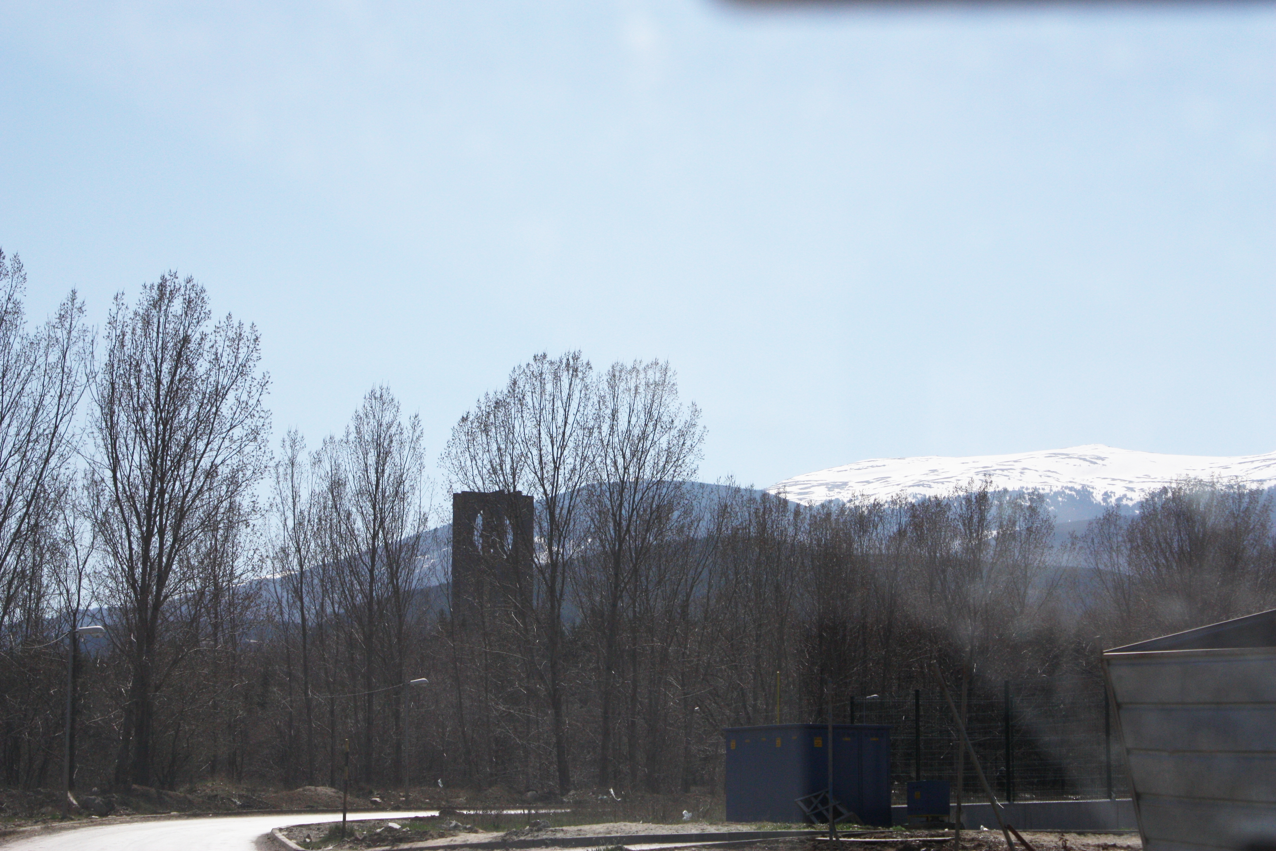 The bells, Die Glocken, Kambanite, Sofia, Bulgaria, Камбаните, София